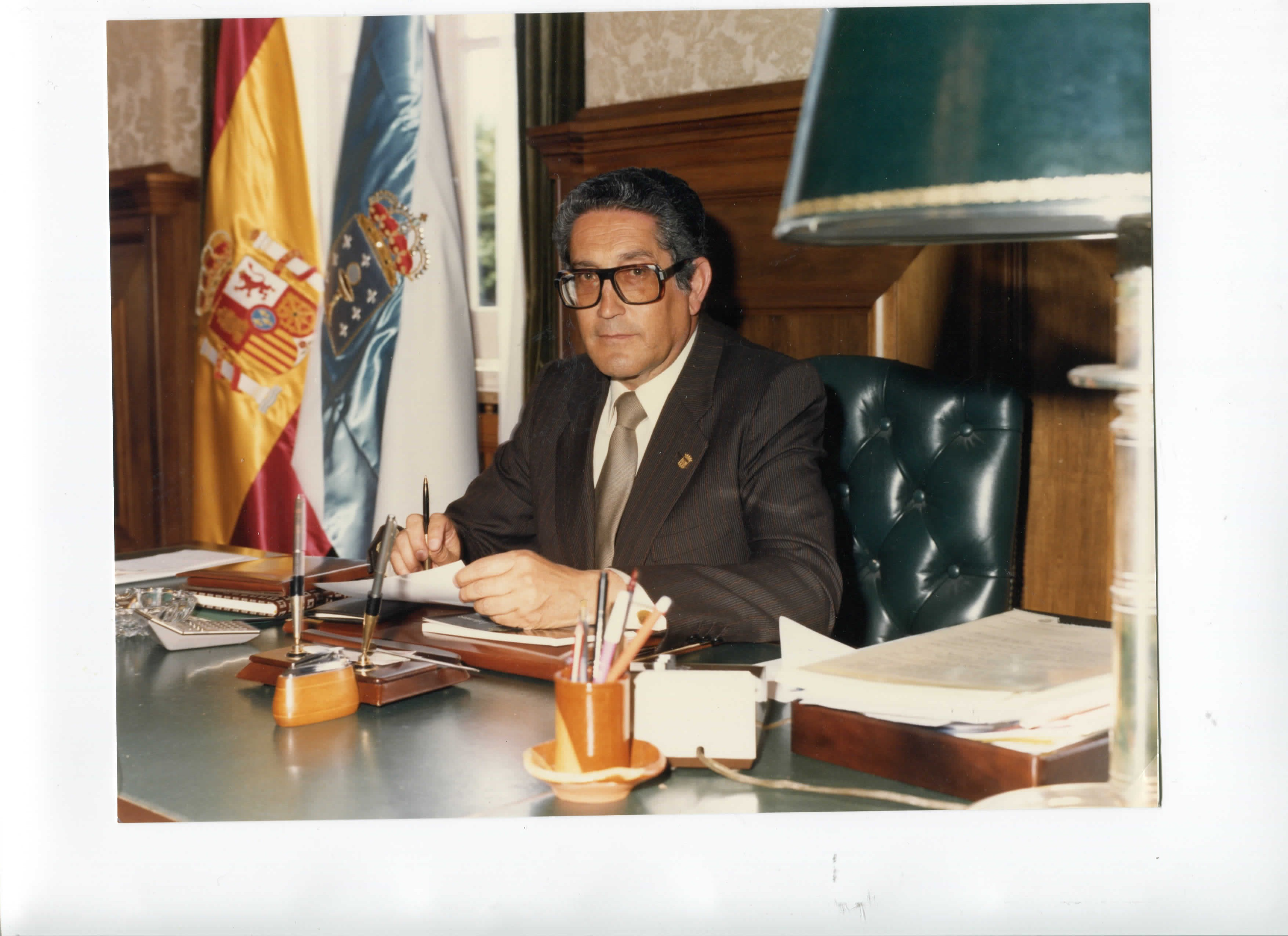 Federico Cifuentes Pérez. Presidente de la Diputación de Pontevedra